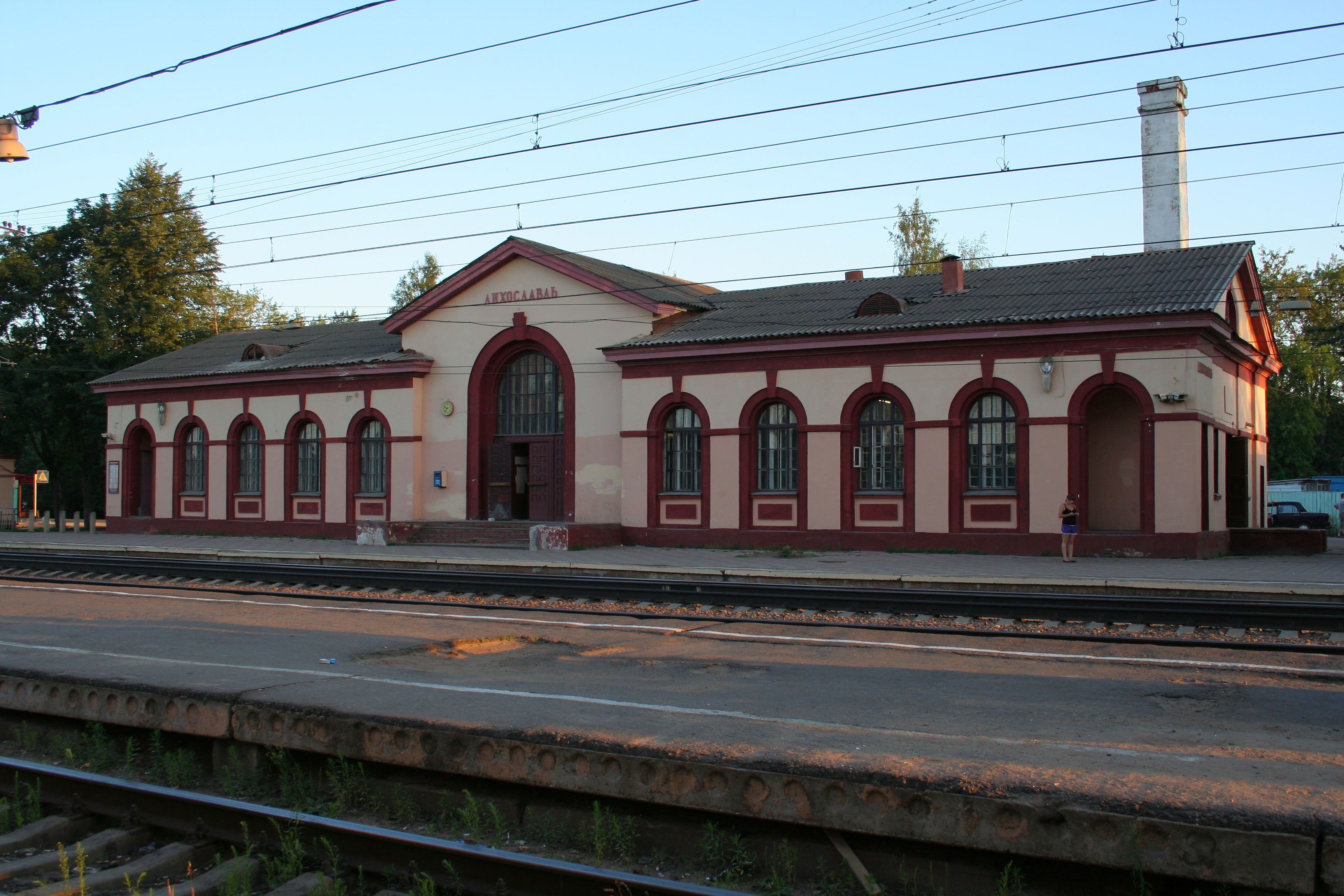 Stadt Lichoslawl (Oblast Twer, Russland). Der Bahnhof.